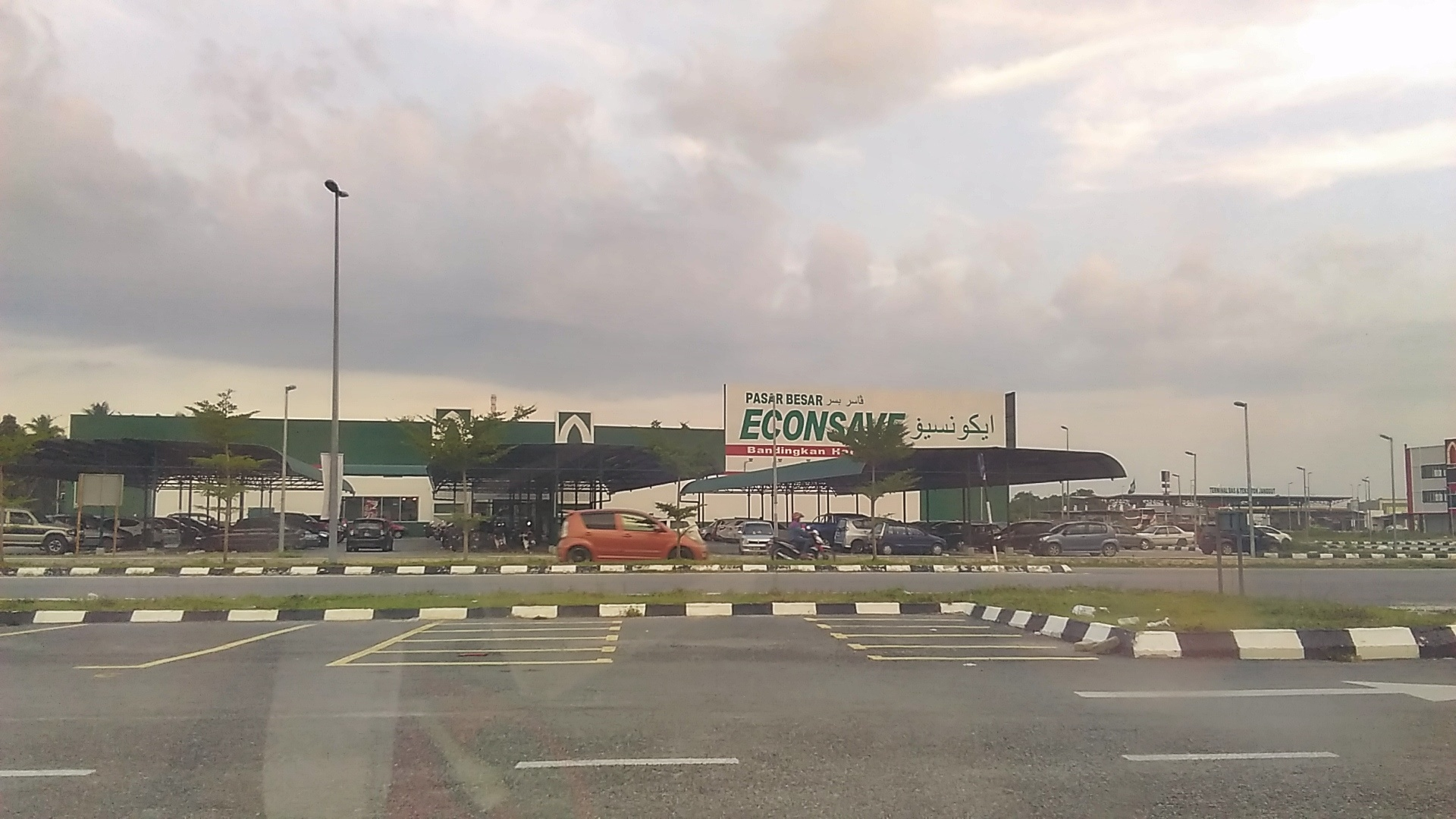 Pasir Puteh Sentral